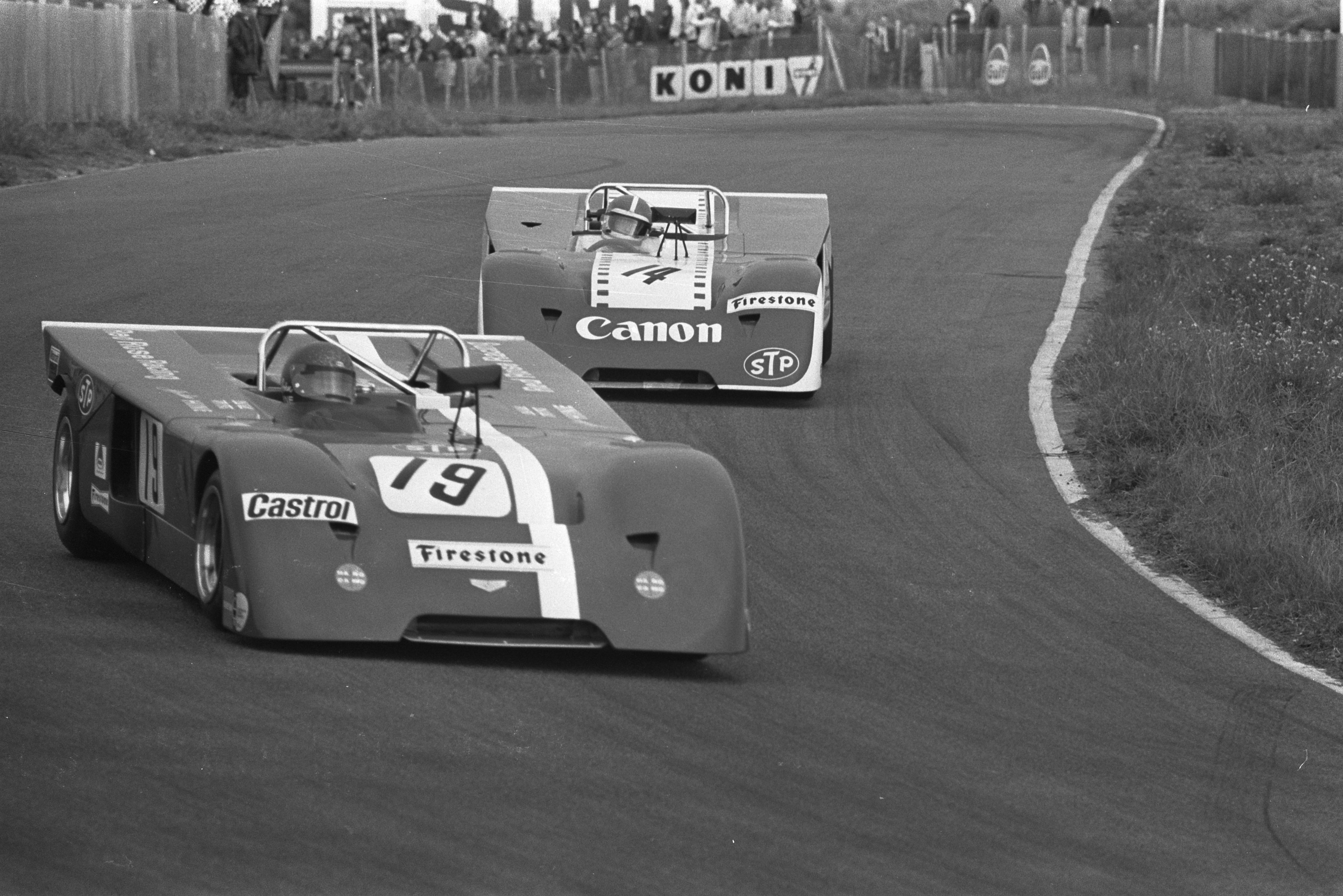 Collectie / Archief : Fotocollectie Anefo Reportage / Serie : [ onbekend ] Beschrijving : Autoraces "Trophy of the Dunes" , Zandvoort, (l) John Hine (in nr. 19) en Ed Swart (in nr. 14) (r) Datum : 26 september 1971 Locatie : Noord-Holland, Zandvoort Trefwoorden : AUTORACES Fotograaf : Evers, Joost / Anefo Auteursrechthebbende : Nationaal Archief Materiaalsoort : Negatief (zwart/wit) Nummer archiefinventaris : bekijk toegang 2.24.01.05 Bestanddeelnummer : 924-9744